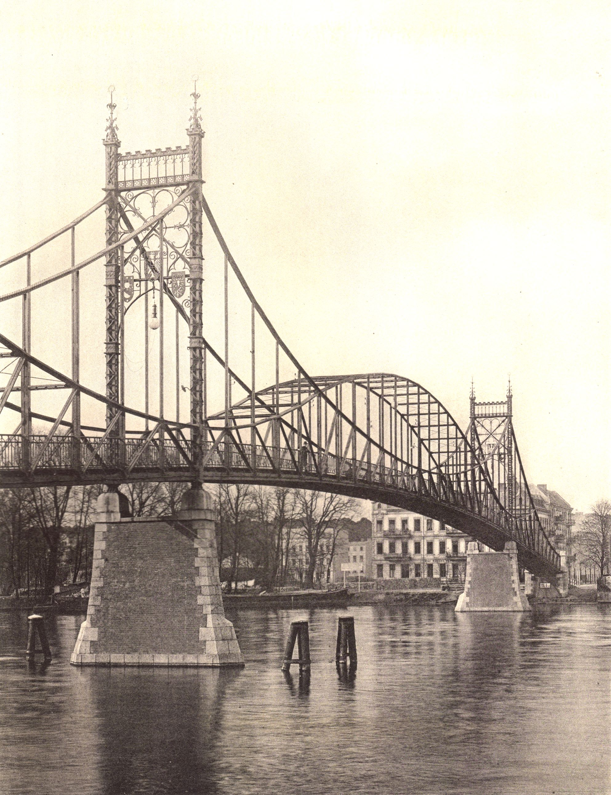 Berlin - Kaisersteg über die Spree, Oberschöneweide